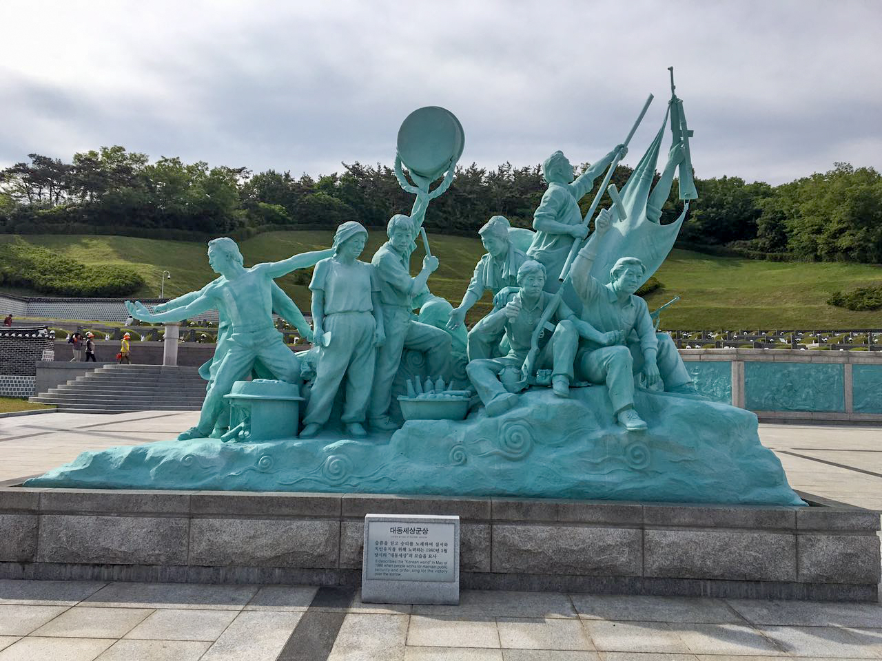 국립 5·18 민주 묘지의 조형물